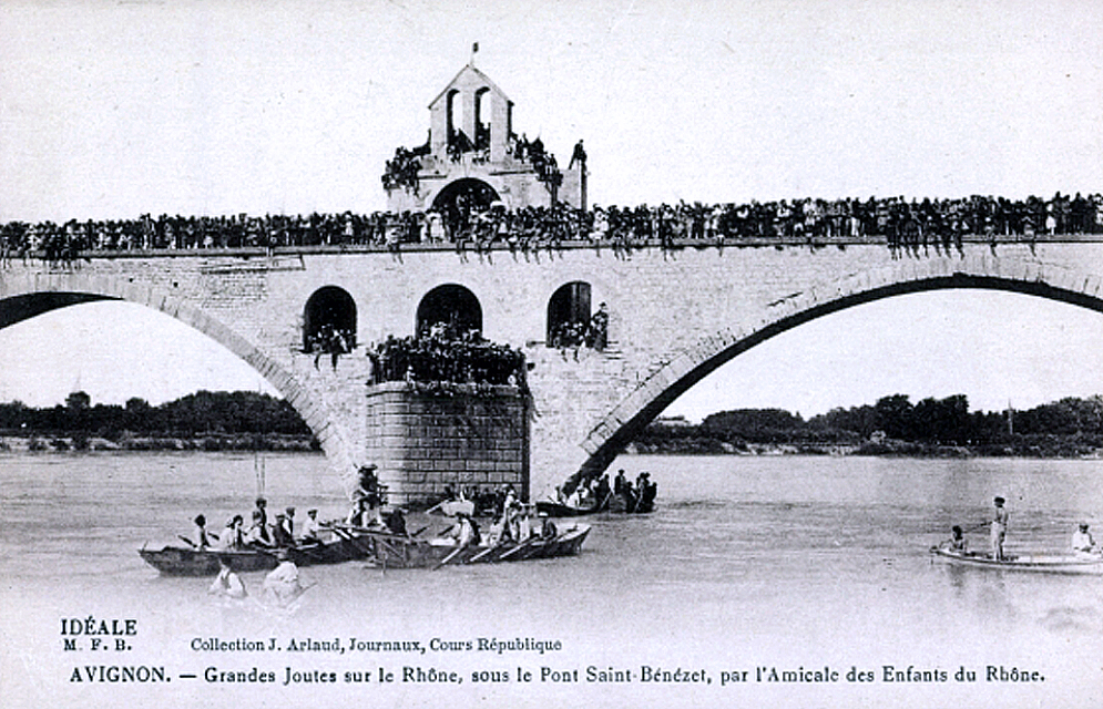 Grandes joutes sous le Rhône au début du XXe siècle